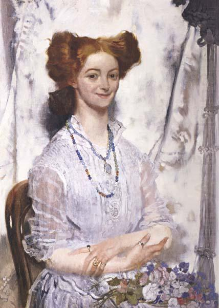 Spéirbhean atá ann, mar eadh: Grace Gifford mar íomhá Éireann Óg